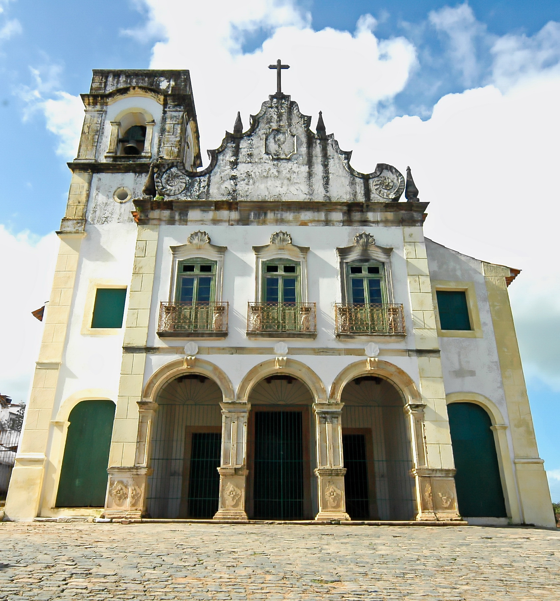 Foto: Passarinho/Pref.Olinda